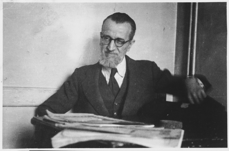 Rav Gustavo Castelbolognesi, docente presso la Scuola Ebraica di Milano, 1940.